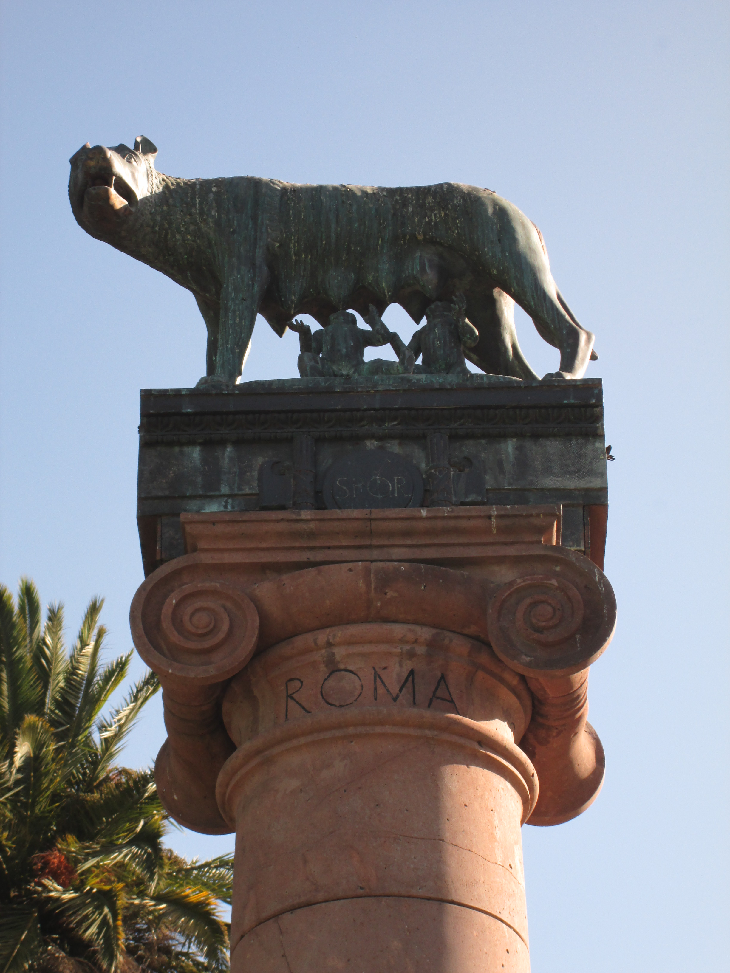 "A la Ciudad de Valparaíso Rinde Homenaje La Colonia Italiana MXCXXXVII - XV - E - F"